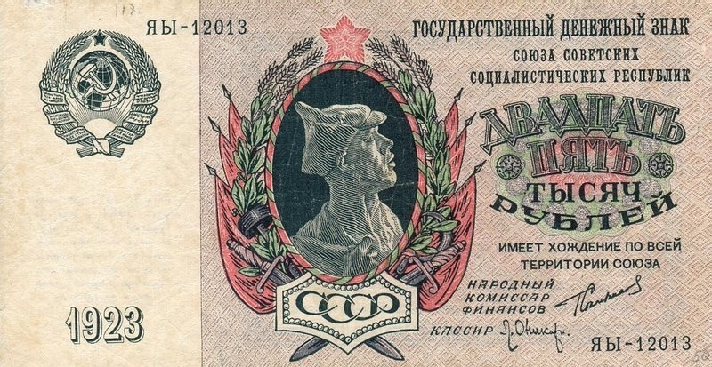 25 000 рублей СССР. Аверс